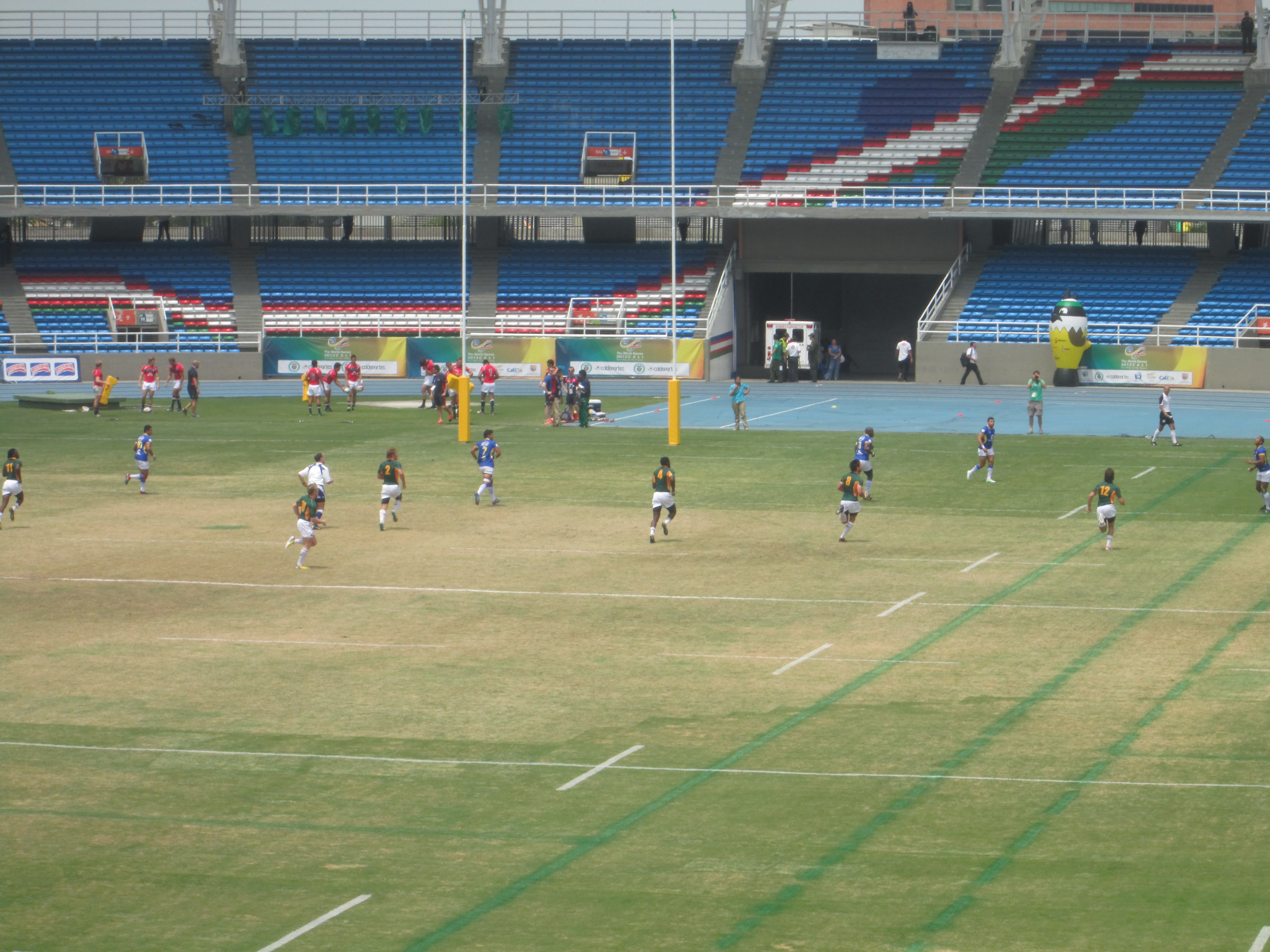 Colombia vs Sudáfrica - Rugby sevens - World Games 2013